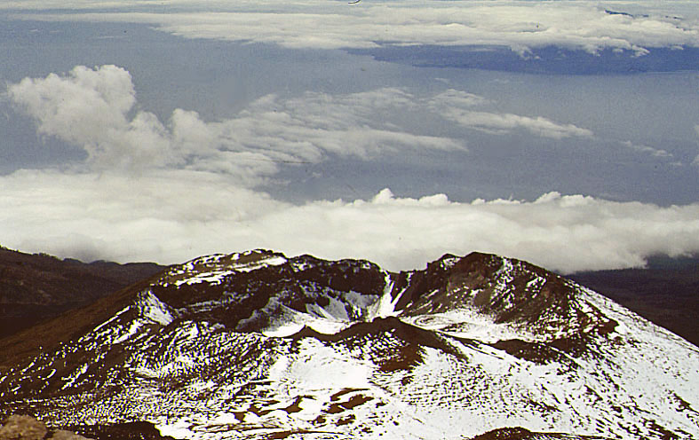 Pico Viejo vom Gipfel des Teide im Hintergrund La Gomera (Februar 1983)